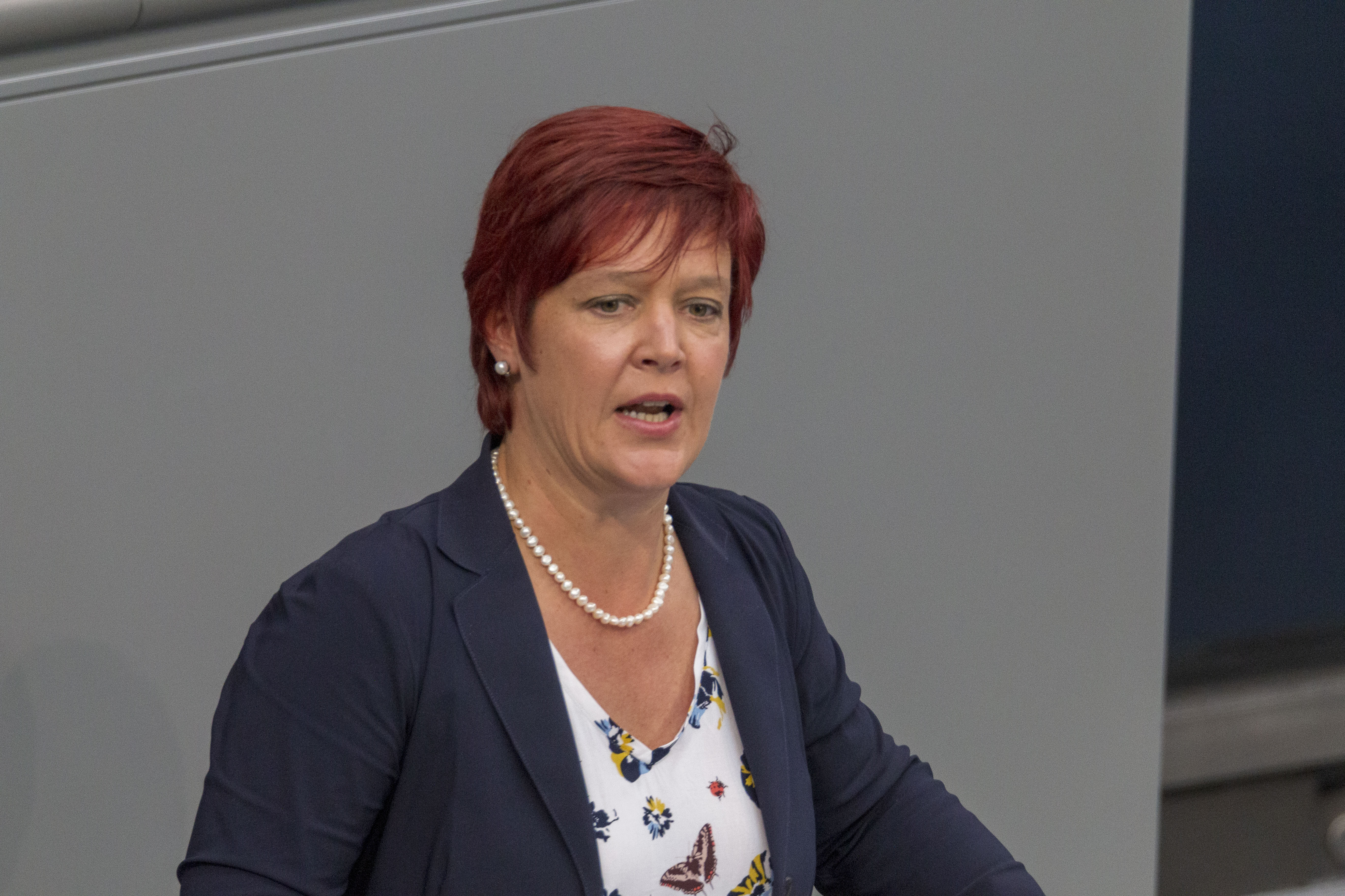 Susanne Ferschl während einer Plenarsitzung des Deutschen Bundestages am 2. Juli 2020 in Berlin.